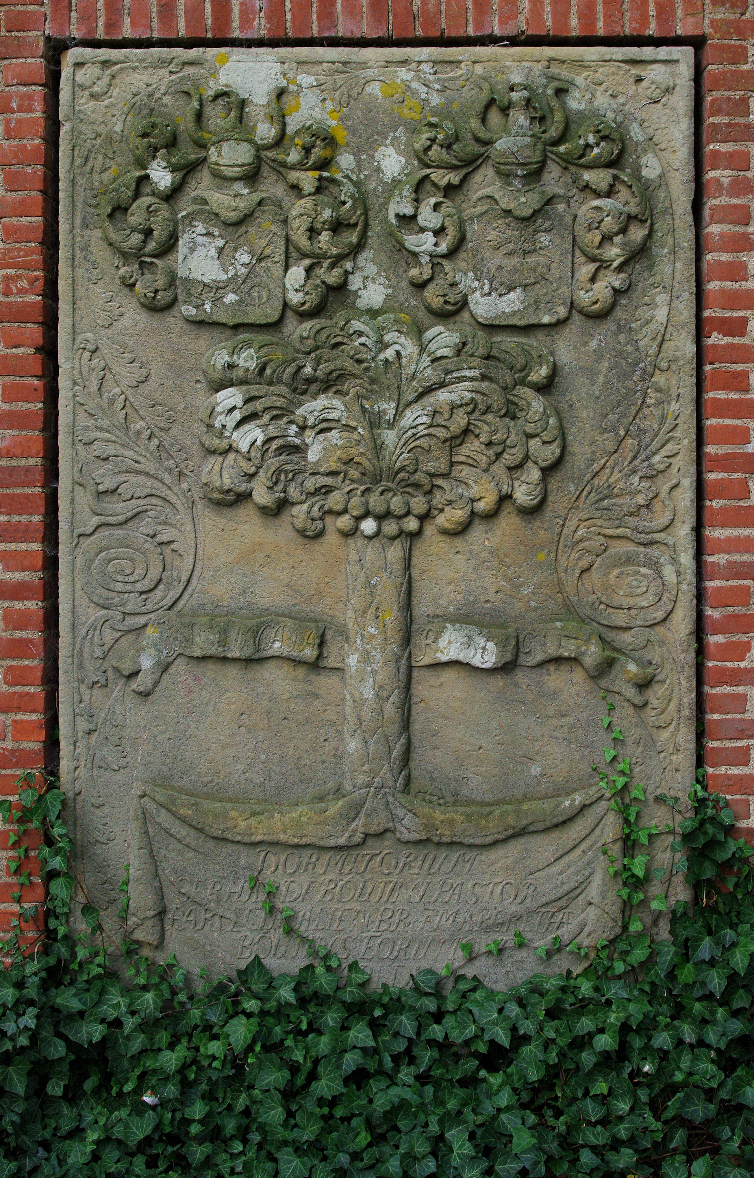 Grabstein, der in die Kirchenmauer eingelassen ist